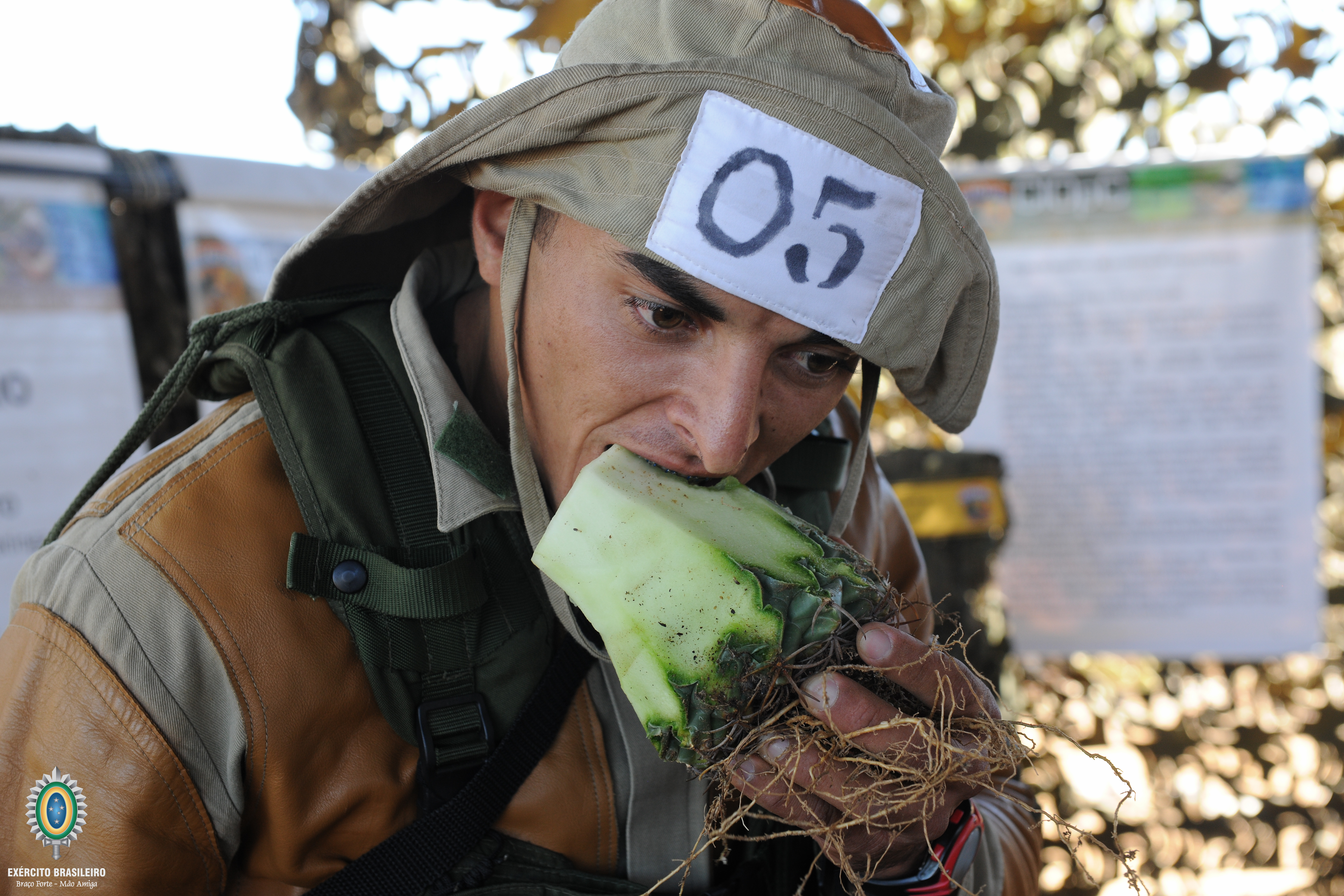 Foto: Ten Edvaldo/EB